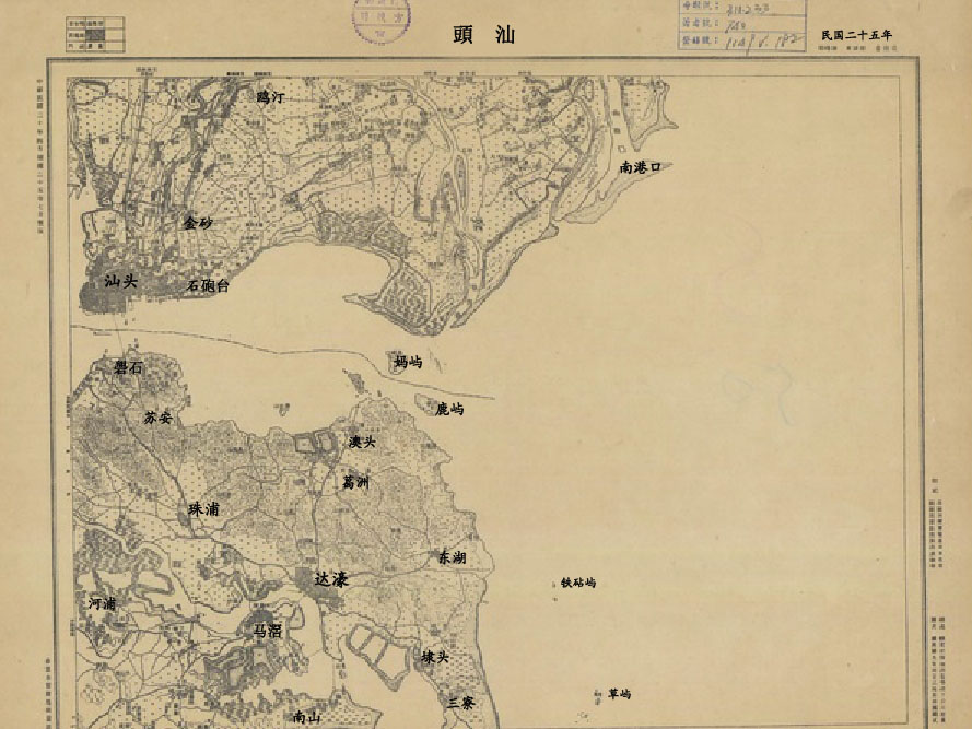 1936年汕头老地图基础上修改而成。